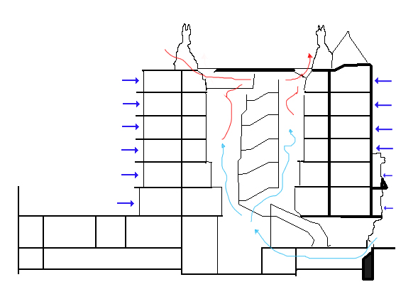 Secció amb l'esquema de ventilació natural de la casa Batlló (1904-1906), obra d'Antoni Gaudí (Barcelona, Catalunya)